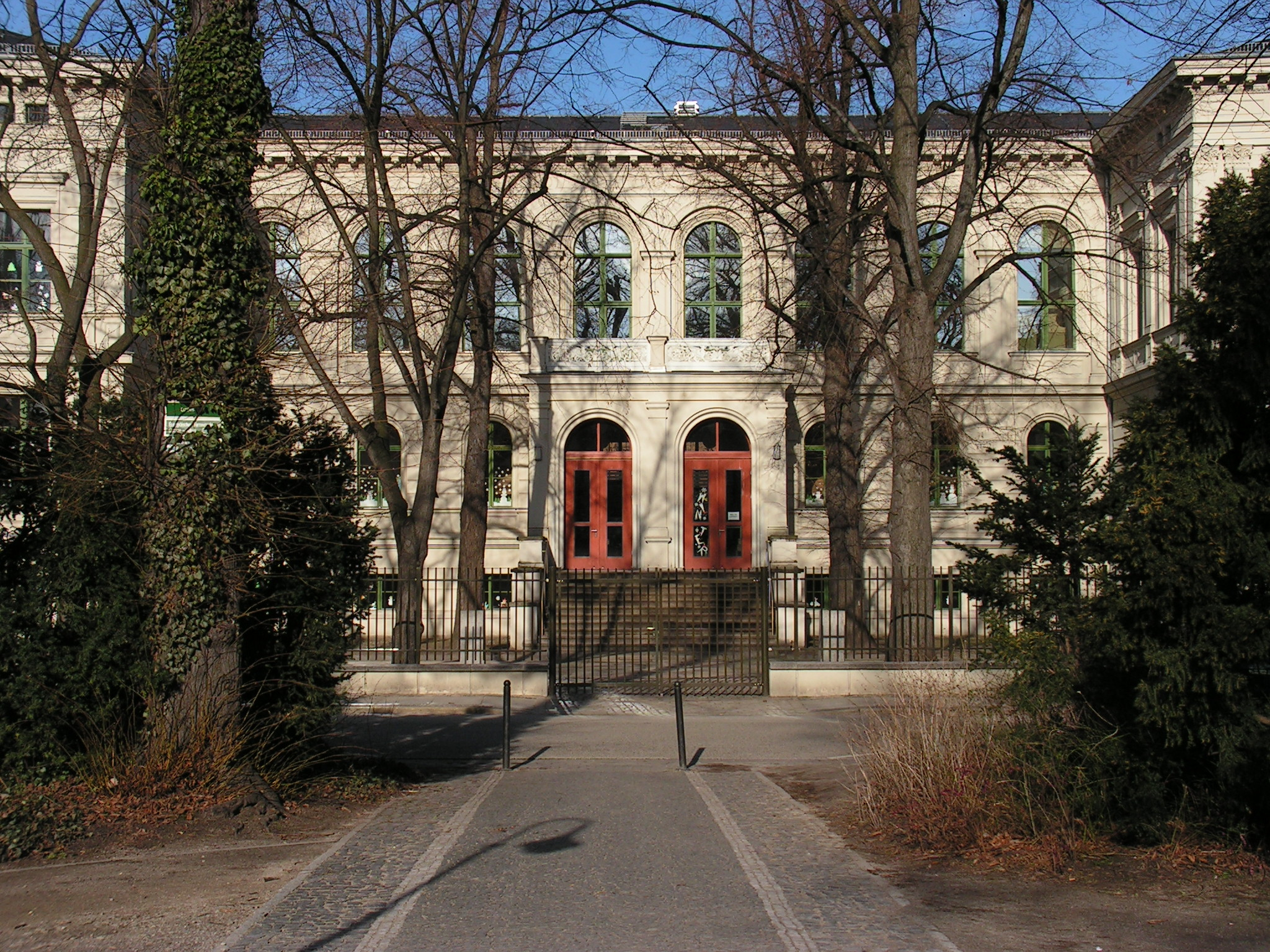 Erich Kaestner Grundschule